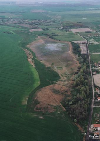 Cserkeszőlő, Hungary, aerial photography